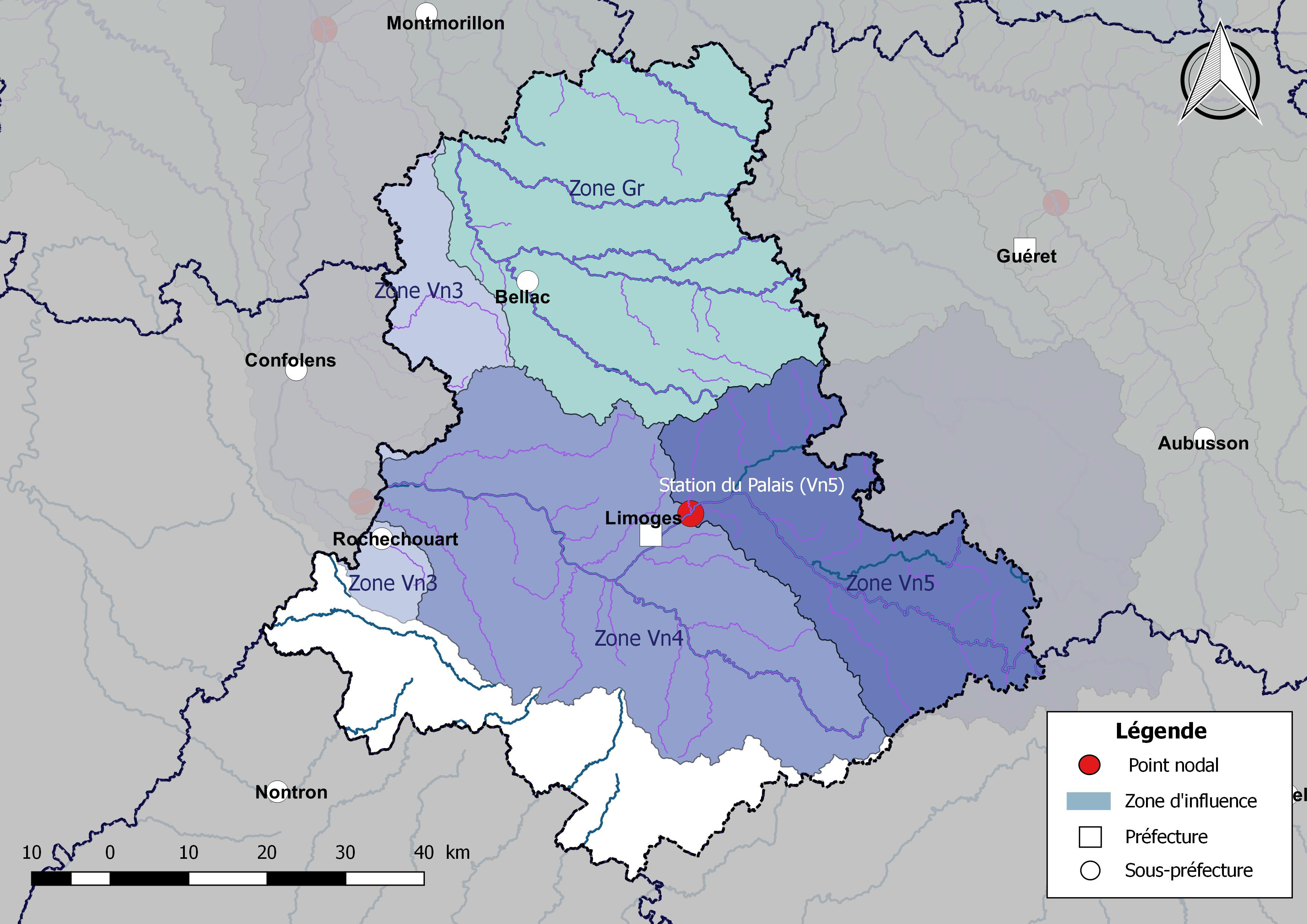 Carte des zones d'influence des points nodaux dont dépend le département de la Haute-Vienne (France).